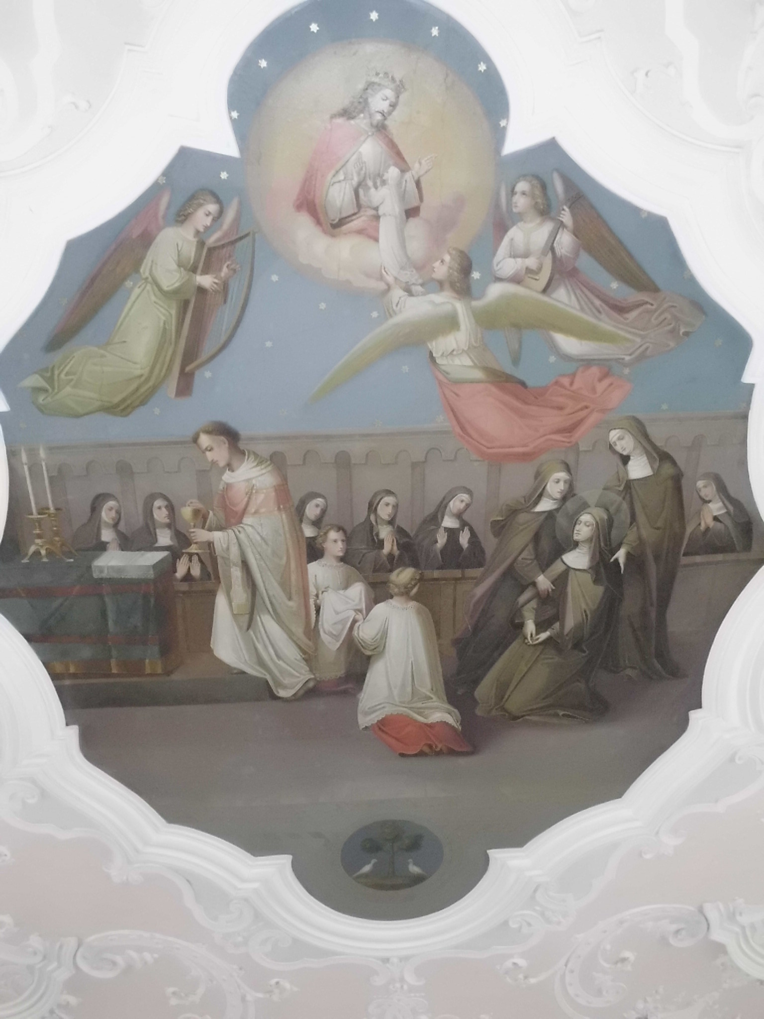 Absberg, Landkreis Weißenburg-Gunzenhausen (Bayern), Ehemaliges Deutschordensschloss, Schlosskapelle (heute Kath. Pfarrkirche St. Ottilia), Deckengemälde "Sterben der hl. Ottilia"